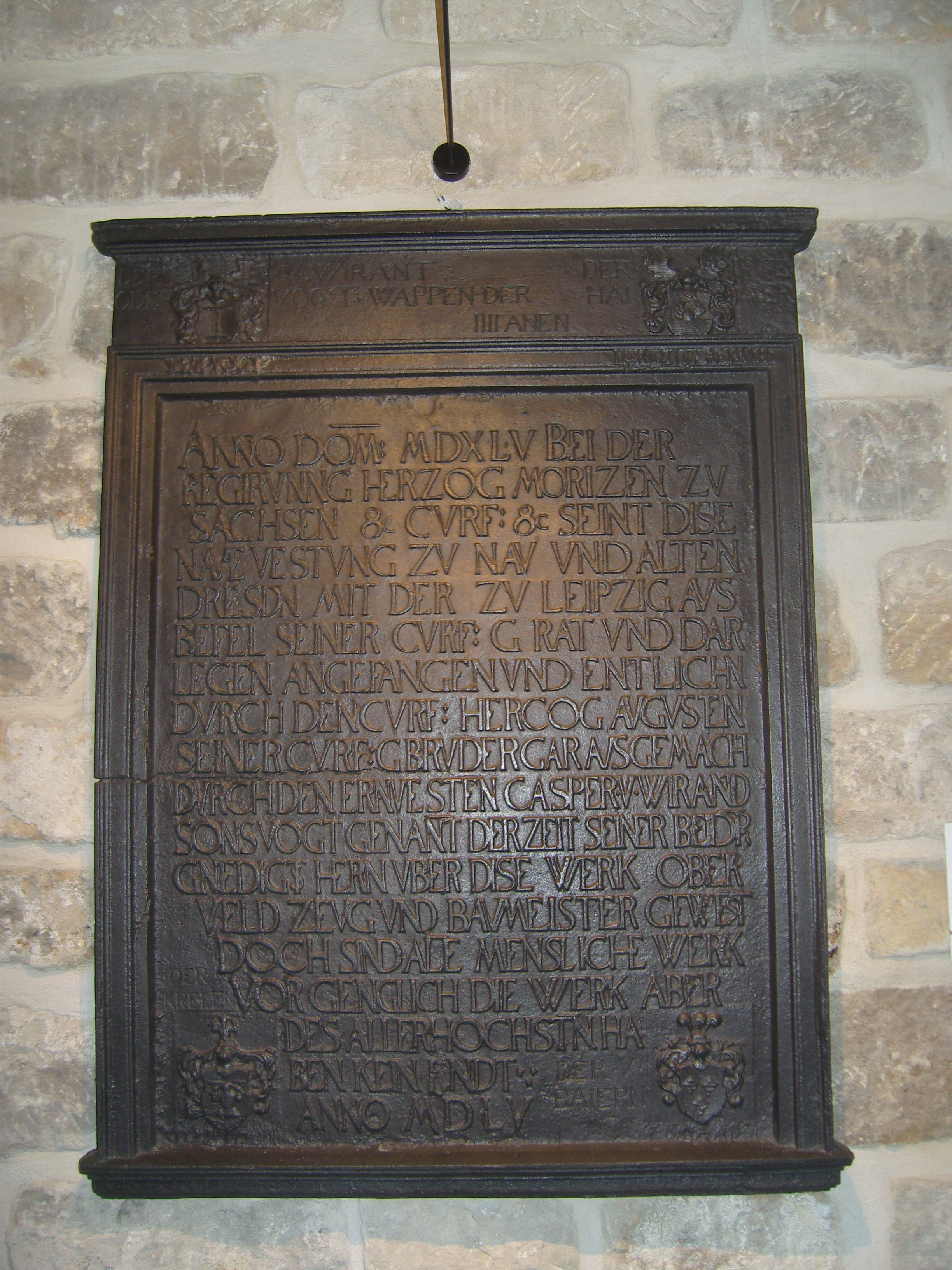 Kopie einer Gedenktafel aus Anlass der 450-jährigen Wiederkehr der Erbauung der Piatta Forma (Teil der Dresdner Befestigungsanlagen)